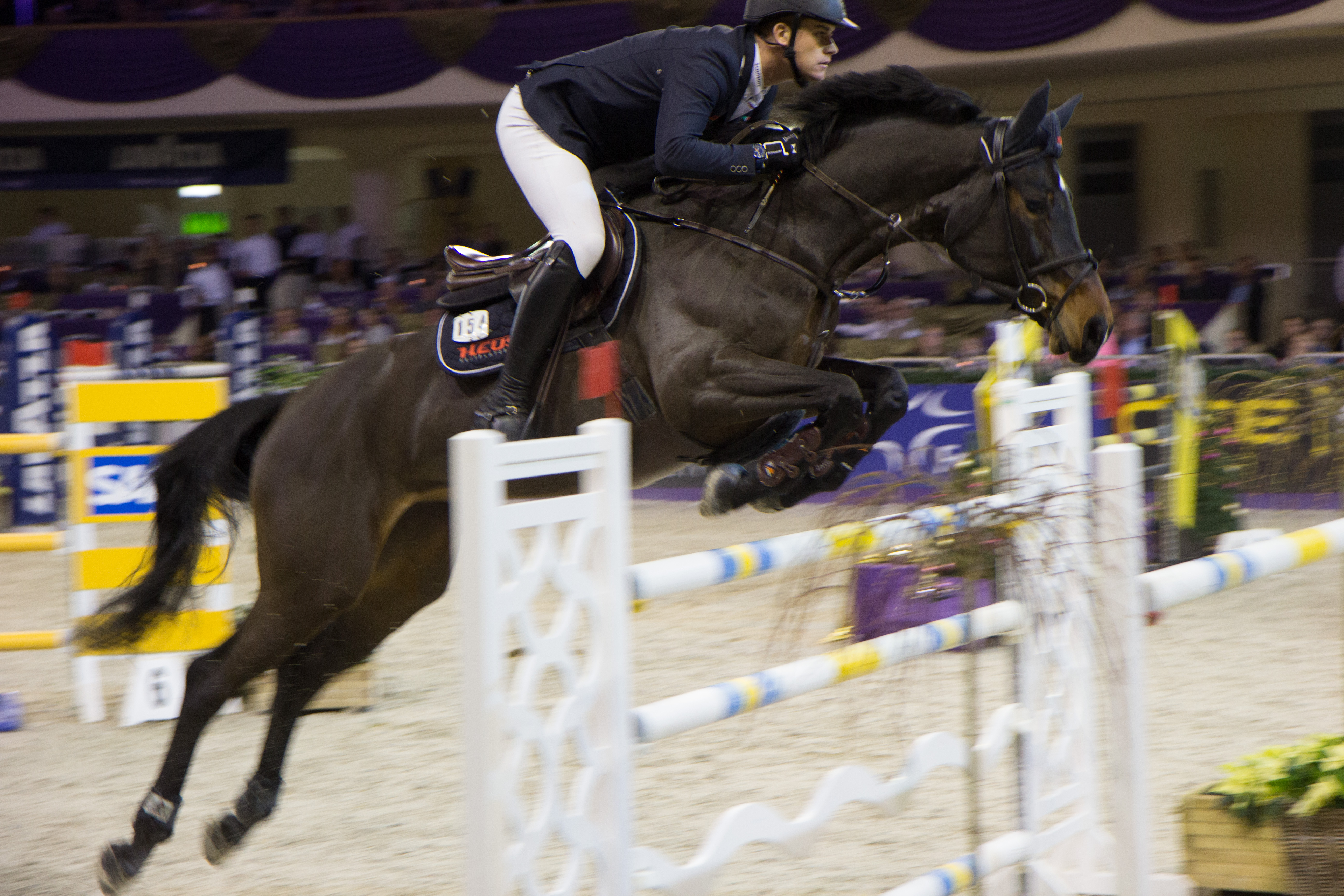 Internationales Festhallen Reitturnier 2017 in Frankfurt.Jörg Oppermann auf Amelie108